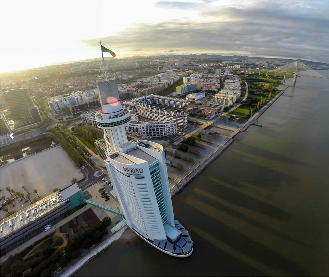 O mais alto edifício de Portugal